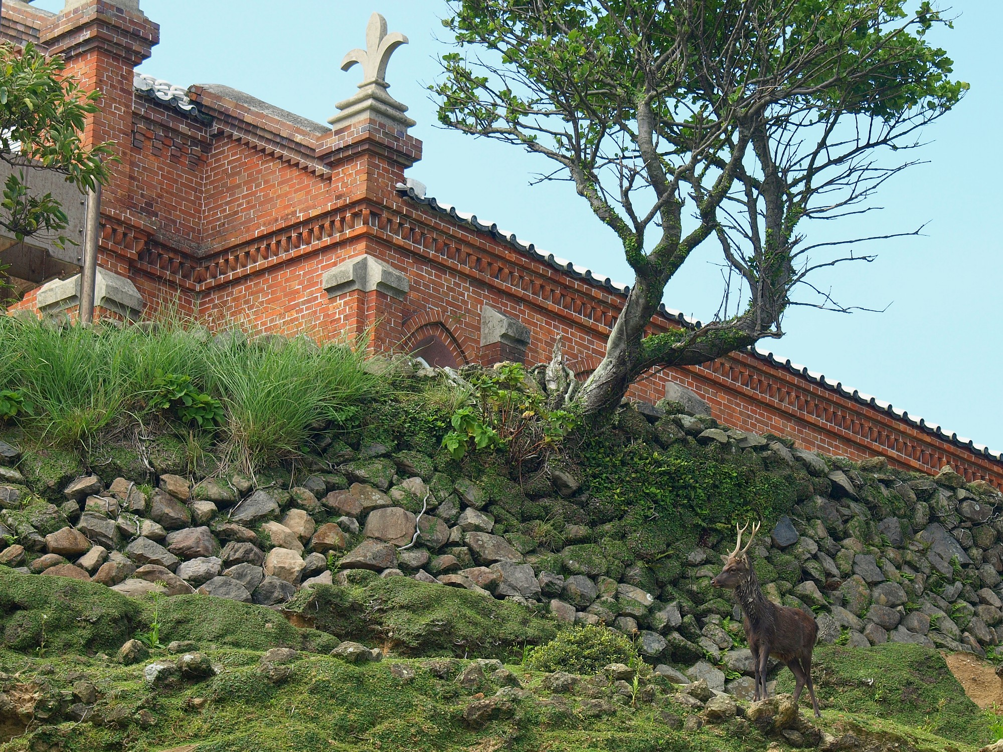 長崎県小値賀町野崎島の野首教会と、野生の鹿（九州鹿）